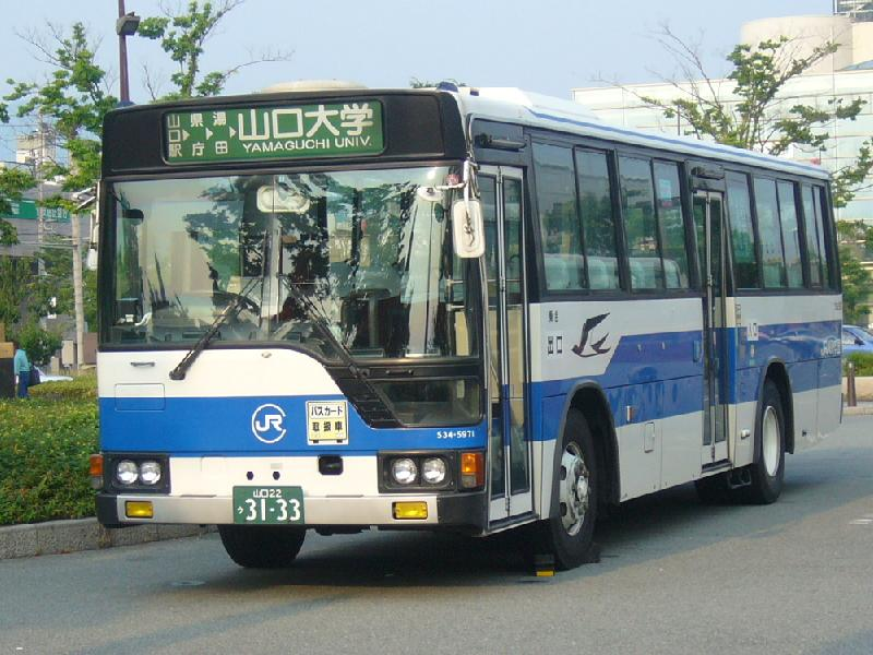 登録番号 山口22う31-33 中国ジェイアールバス(Chugoku JR bus)所属 車番534-5971 防長線用